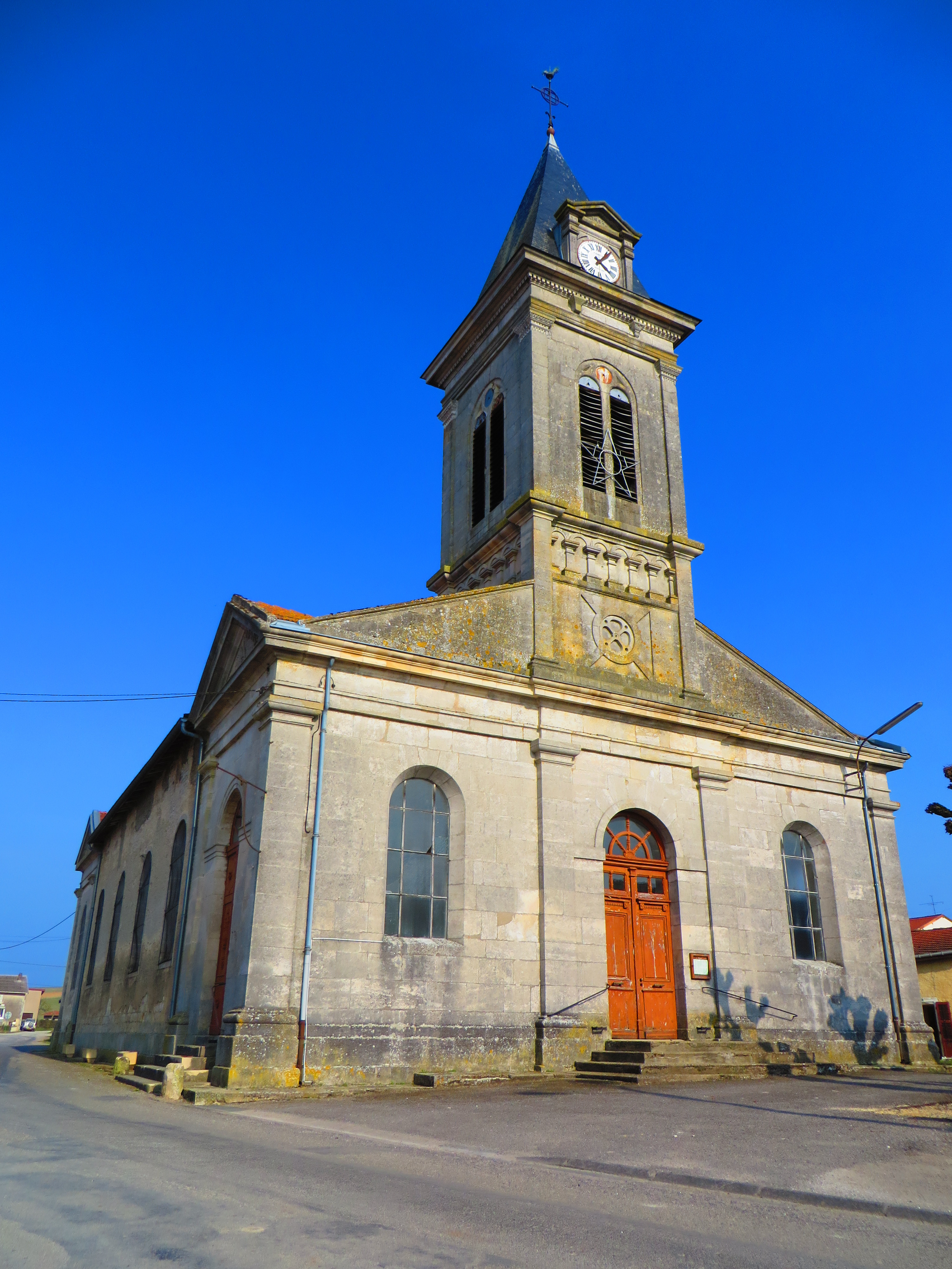 Troyon église Saint-Martin